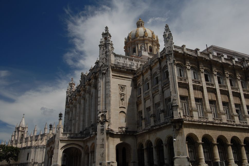 Museo de la Revolucion.